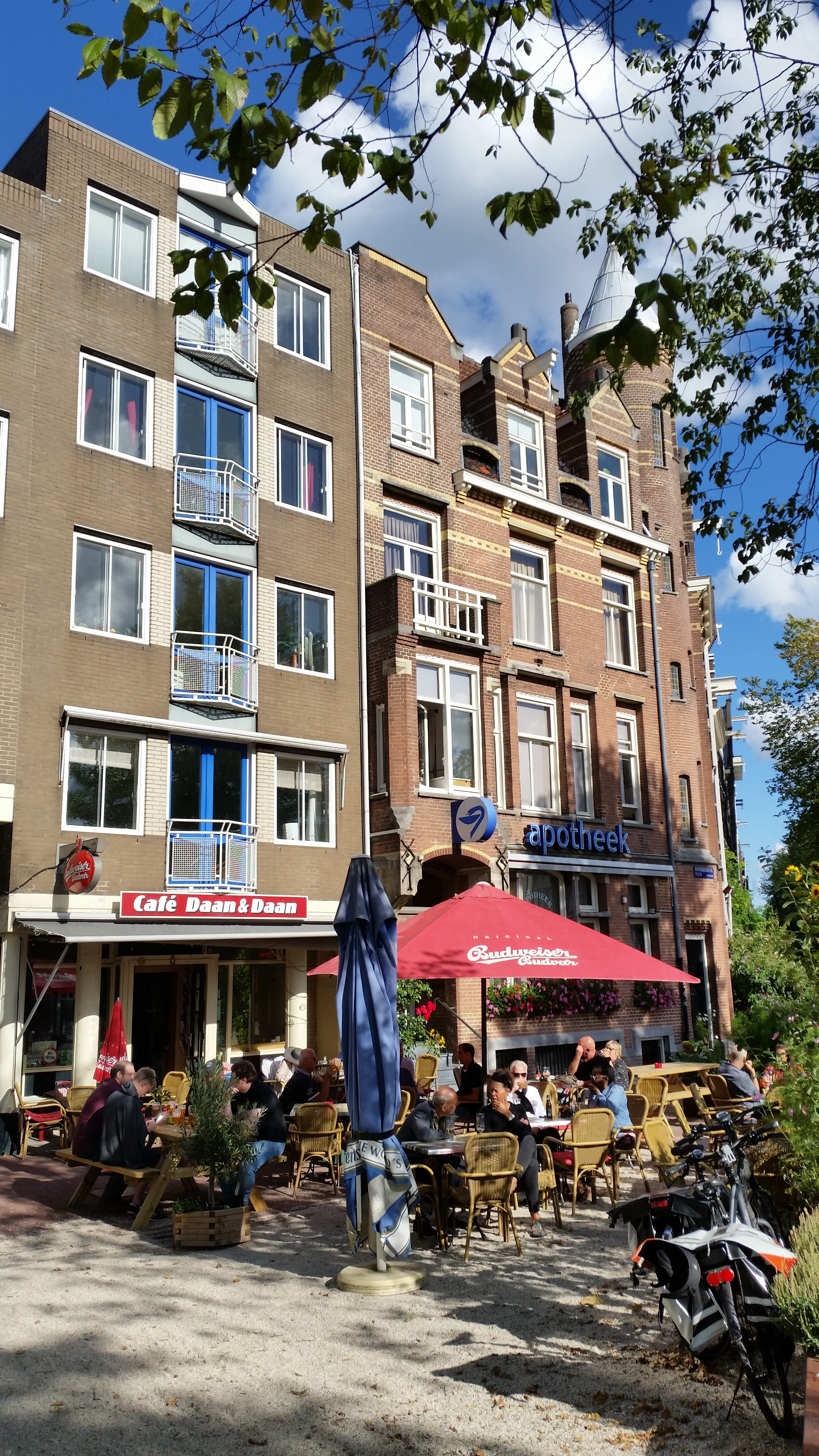 Kattenburgerplein 38 (rechts; gemeentelijk monument) en 39 (links) Amsterdam